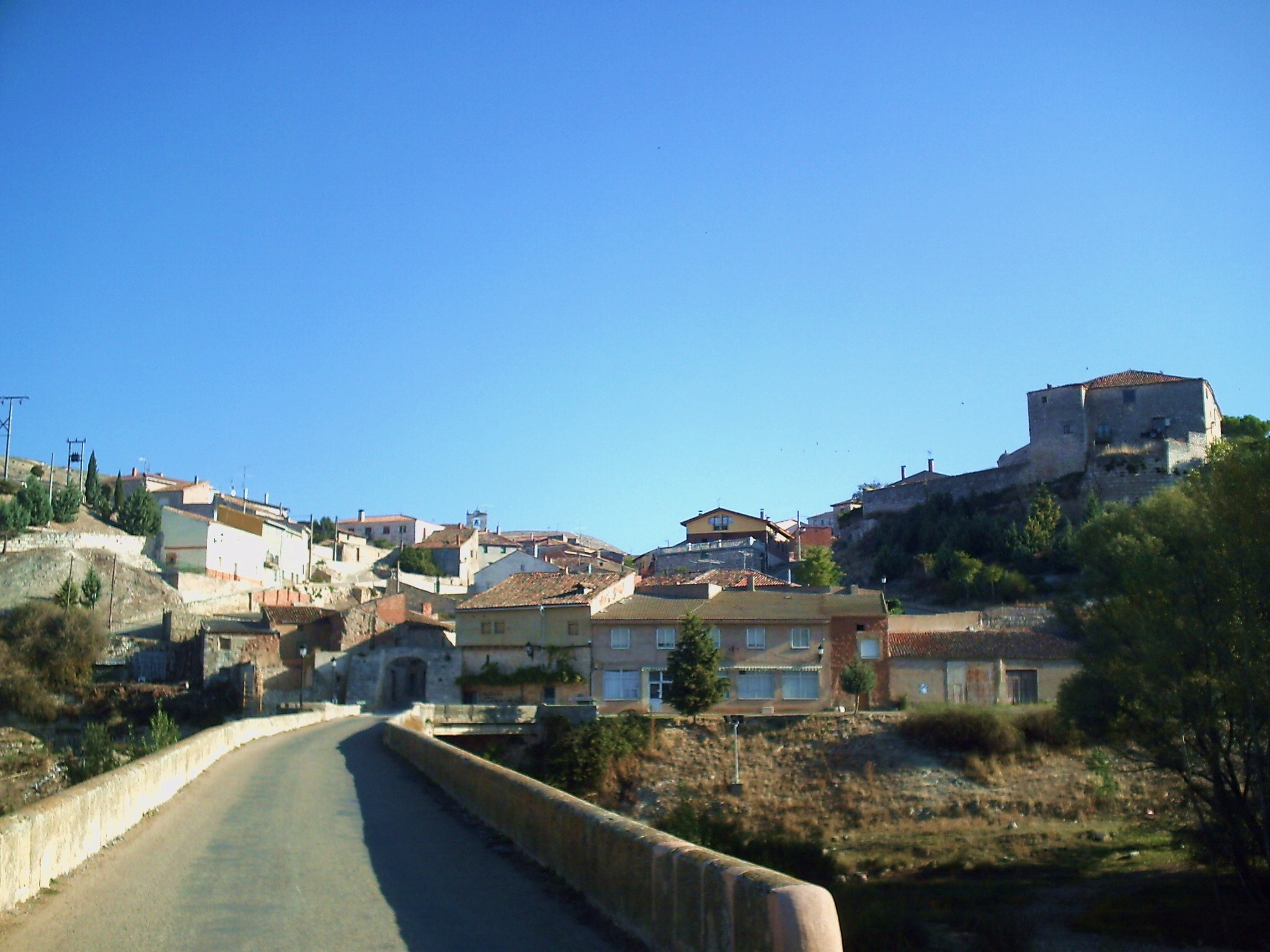 Palenzuela. Puente romano sobre el rio Arlanza y al fondo la Puerta de "La Paz".